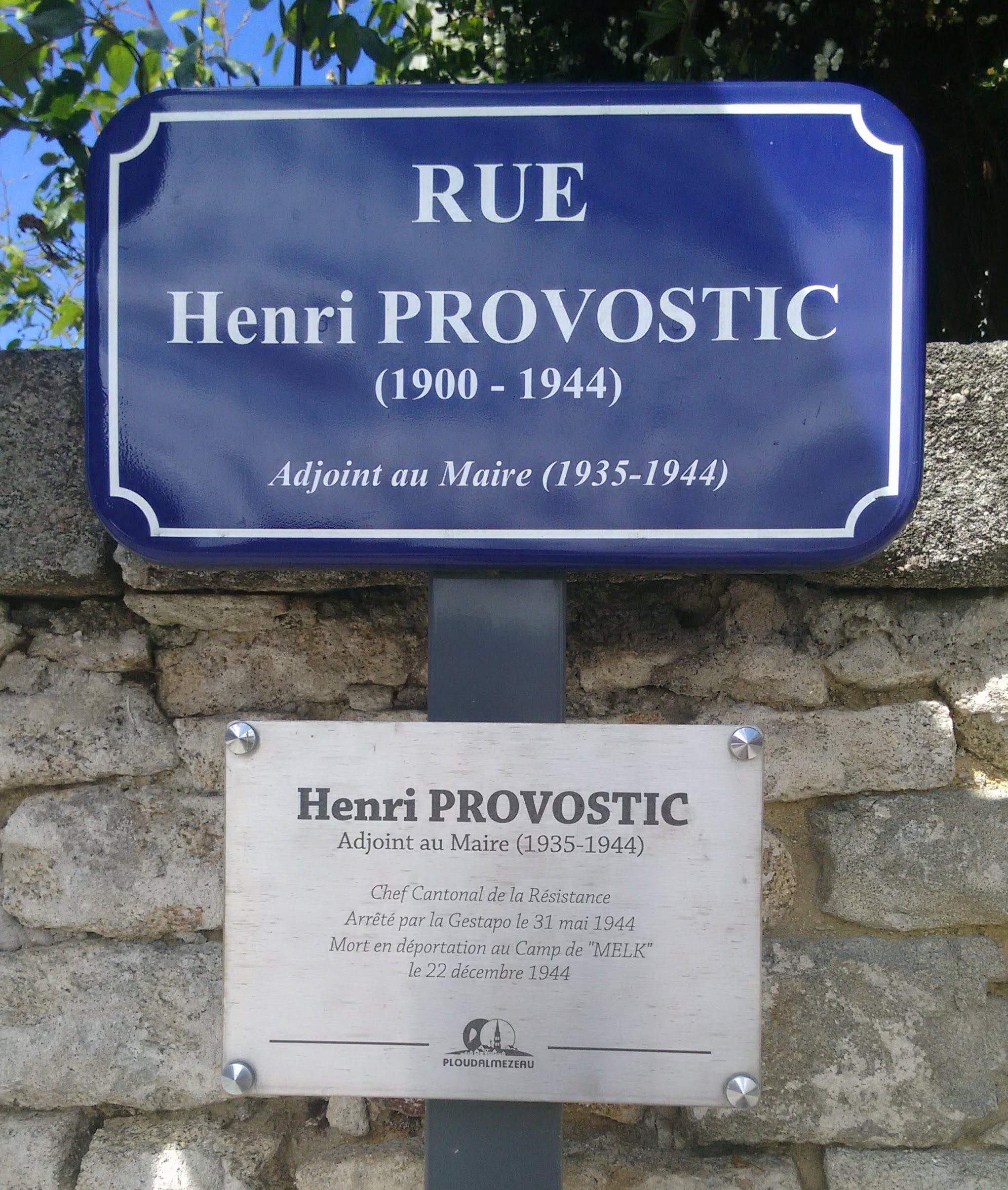 plaque de rue à Ploudalmézeau - Henri Provostic